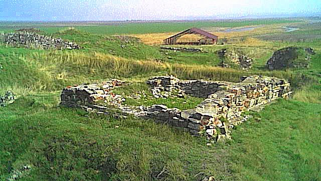 Byzantinischer Kirchenbau des 10./11. Jahrhunderts in des spätantiken Kastellgründung Dinogetia südöstlich der Donaustadt Galatz.